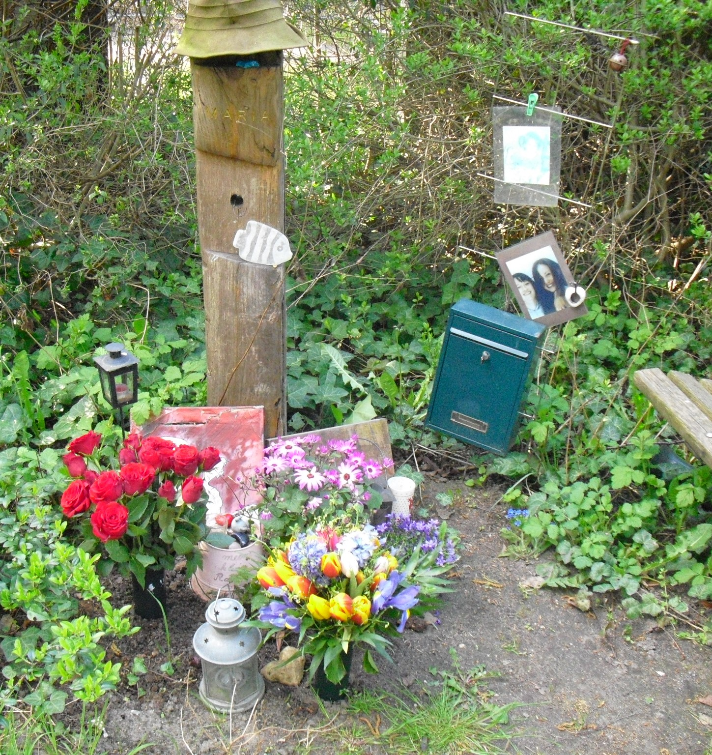 Grabdenkmal für die Schauspielerin Maria Kwiatkowsky auf dem Neuen Friedhof St. Marien-St. Nikolai in Berlin-Prenzlauer Berg